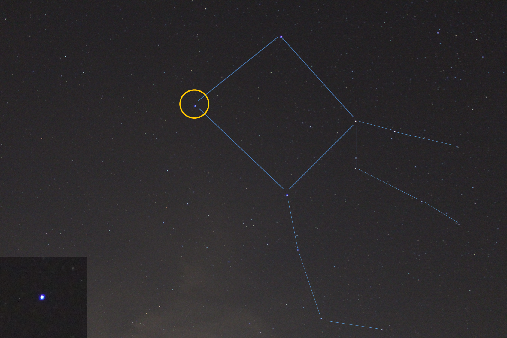 Situació d'Algenib a Pegàs i Imatge d'aquesta.